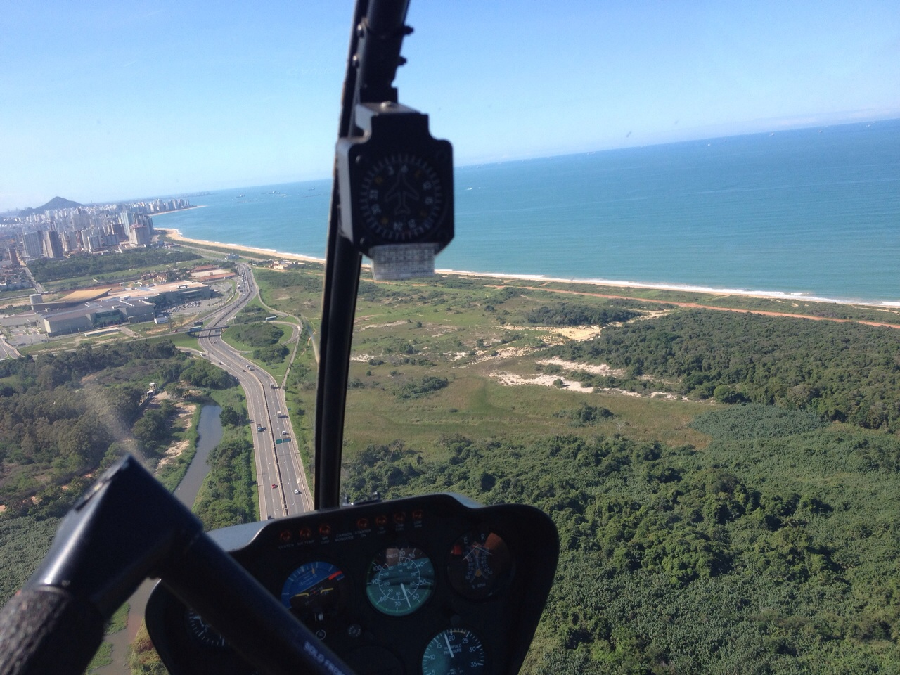 Reserva ecologica de Jacarenema